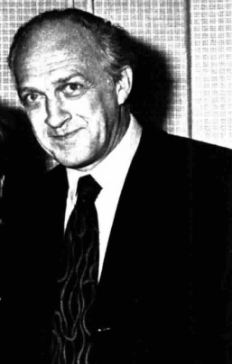 Italian actor Raimondo Vianello